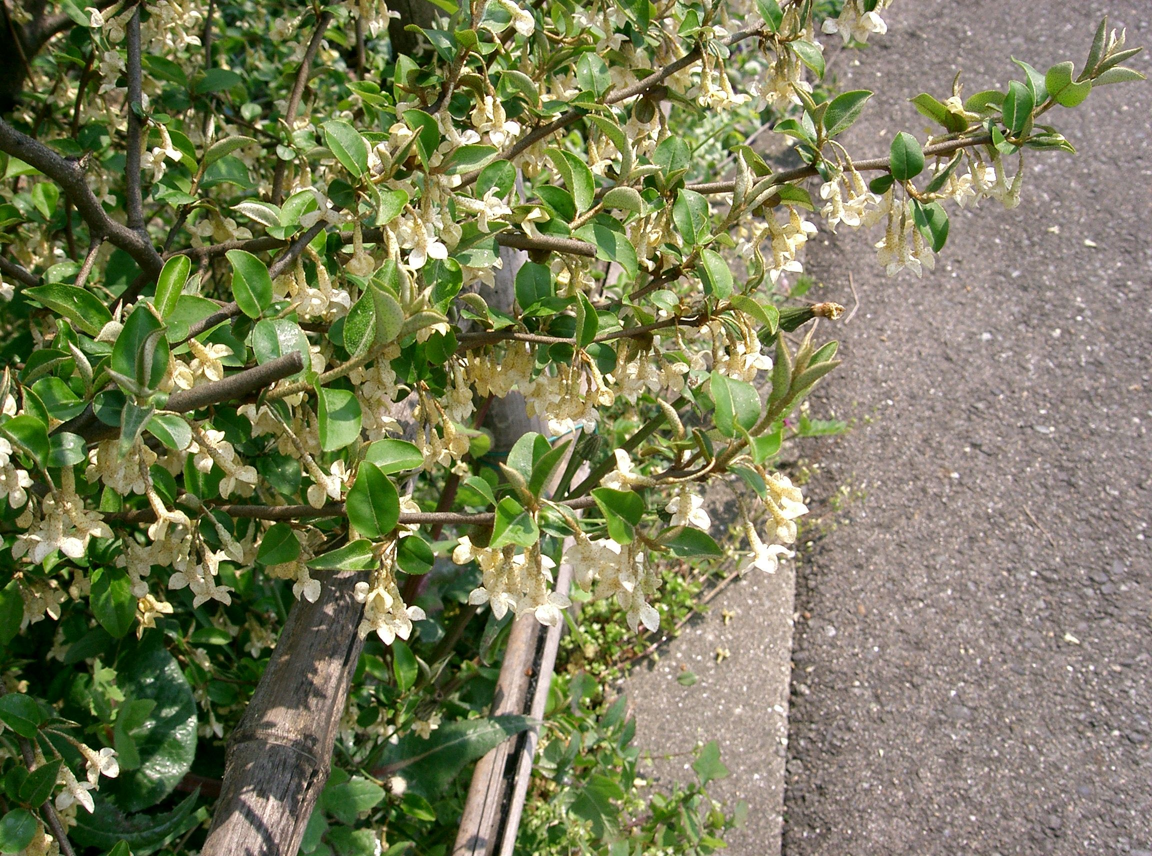 Scientific name Elaeagnus multiflora var. hortensis